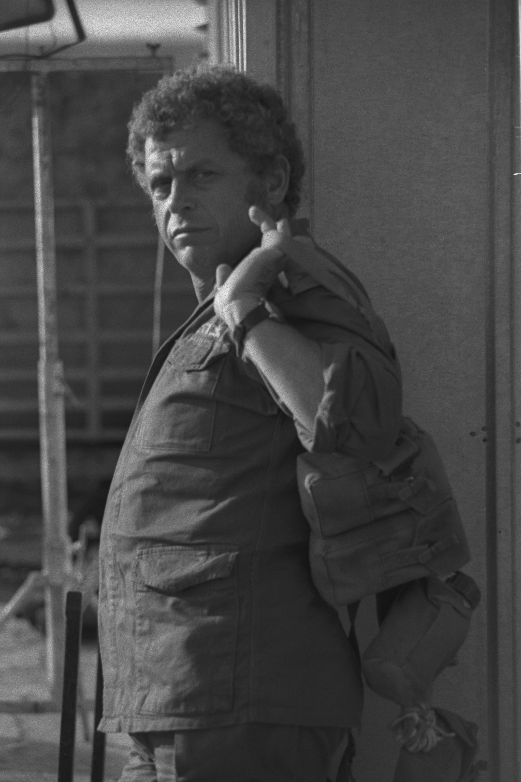 Actor/singer Arik Lavi as Dan Shomron in Golan's "Mivtsa Yonatan" film. השחקן והזמר אריק לביא בתור דן שומרון בסרטו של גולן ";נטבה"